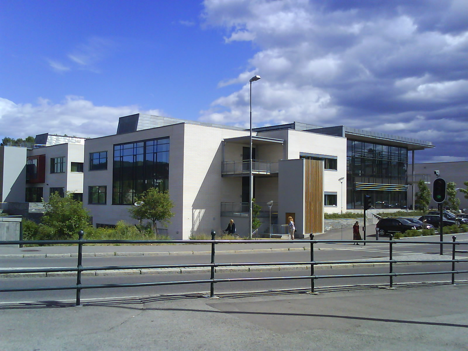 Persbråten videregående skole i Oslo.